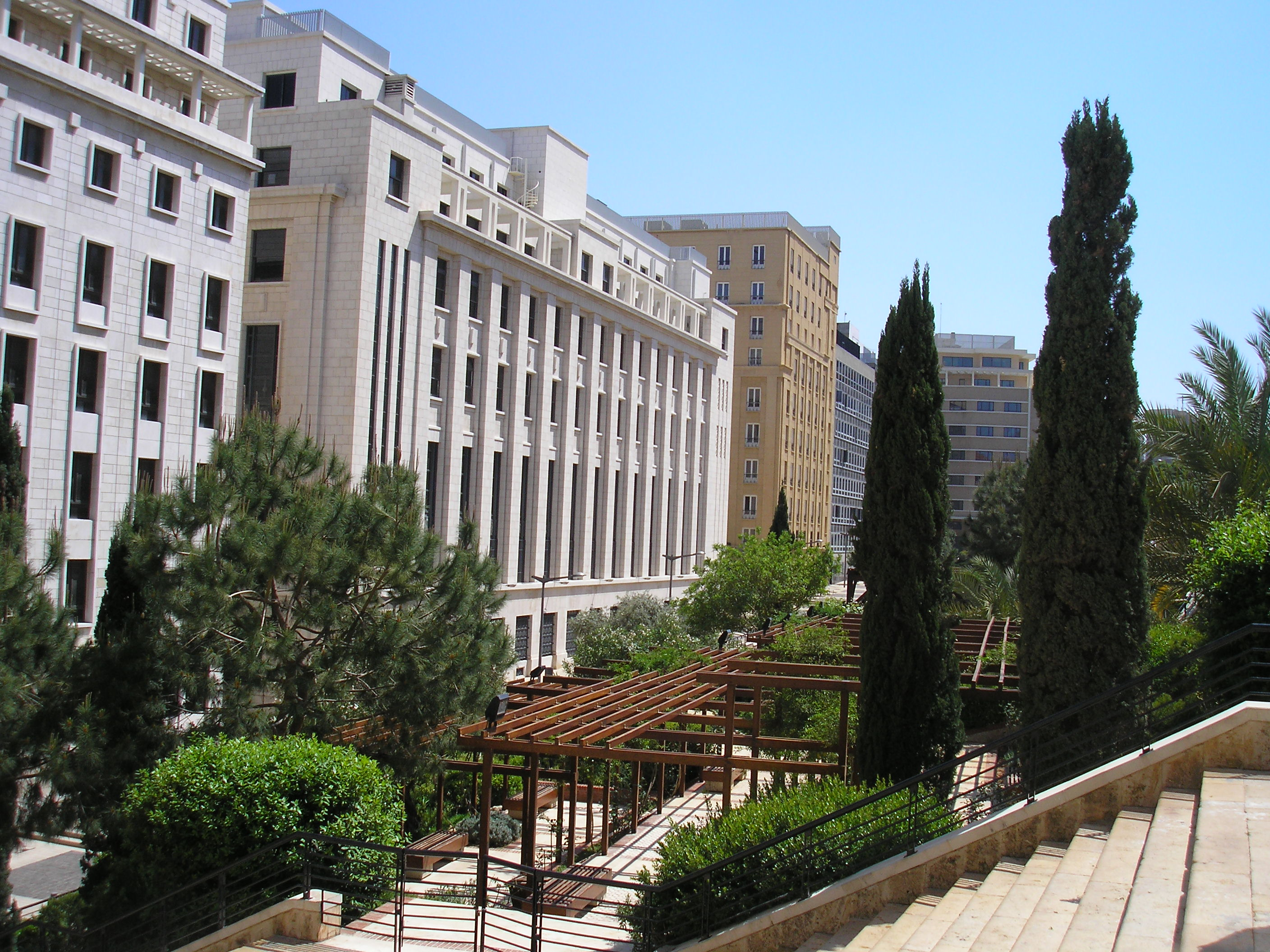 Auteur : Mr SADEK Radi